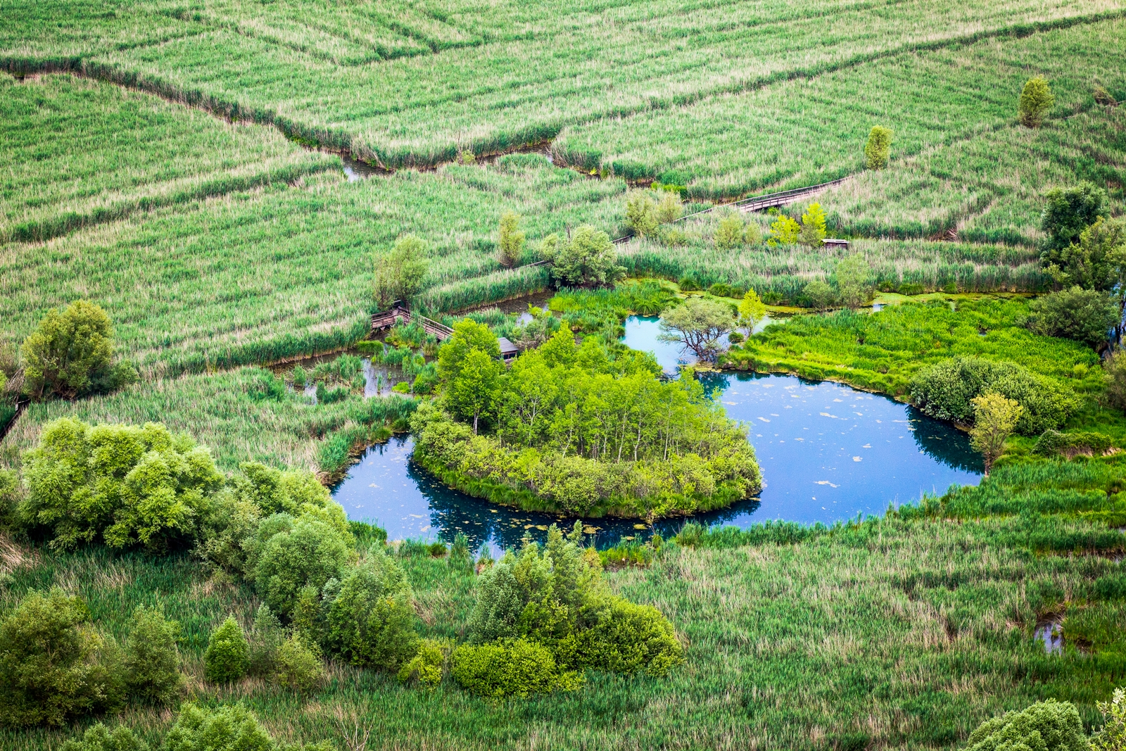 Un fenomeno caratteristico del lago di Posta Fibreno, forse unico in Europa, è la presenza di un'isola galleggiante o come viene chiamata localmente “ La Rota”. Si tratta di un piccolo isolotto galleggiante di forma circolare che si sposta all’interno di uno specchio d’acqua, collegato al lago da alcuni canali. Lo spostamento viene generato da due fattori: l’azione combinata del vento e il cambiamento della portata delle sorgenti sotterranee presenti sul fondo. Questo movimento, durante le giornate di forte vento, è possibile seguirlo ad occhio nudo. La “Rota”, così chiamata localmente per la sua forma rotonda, ha un diametro di circa trenta metri. Nella parte centrale ha uno spessore di circa quattro metri. Si presenta come un cono con la punta rivolta verso il basso:quasi certamente venne originata da un’eccezionale corrente sotterranea che fece sollevare il fondo di torba, da quasi nove metri sotto il livello dell’acqua, più di 2000 anni fa. This is a photo of a monument which is part of cultural heritage of Italy.